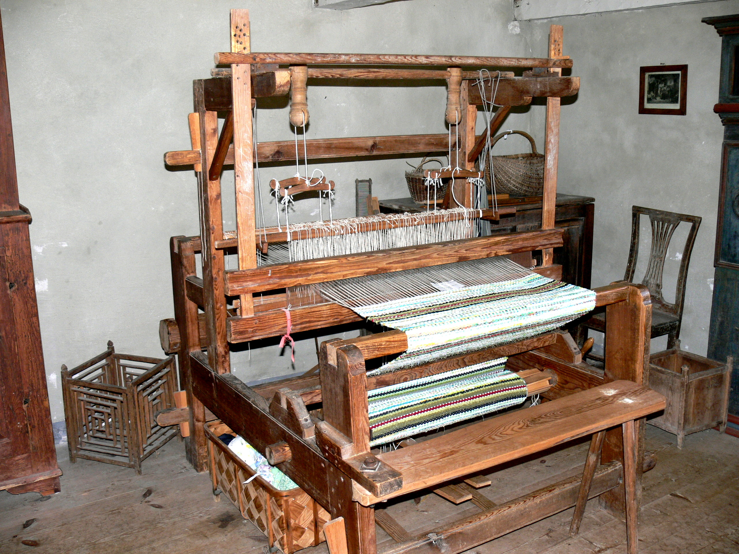 Bunge Museum auf Gotland. Bootsmannshaus ( 19.Jhdt. ): Webstuhl